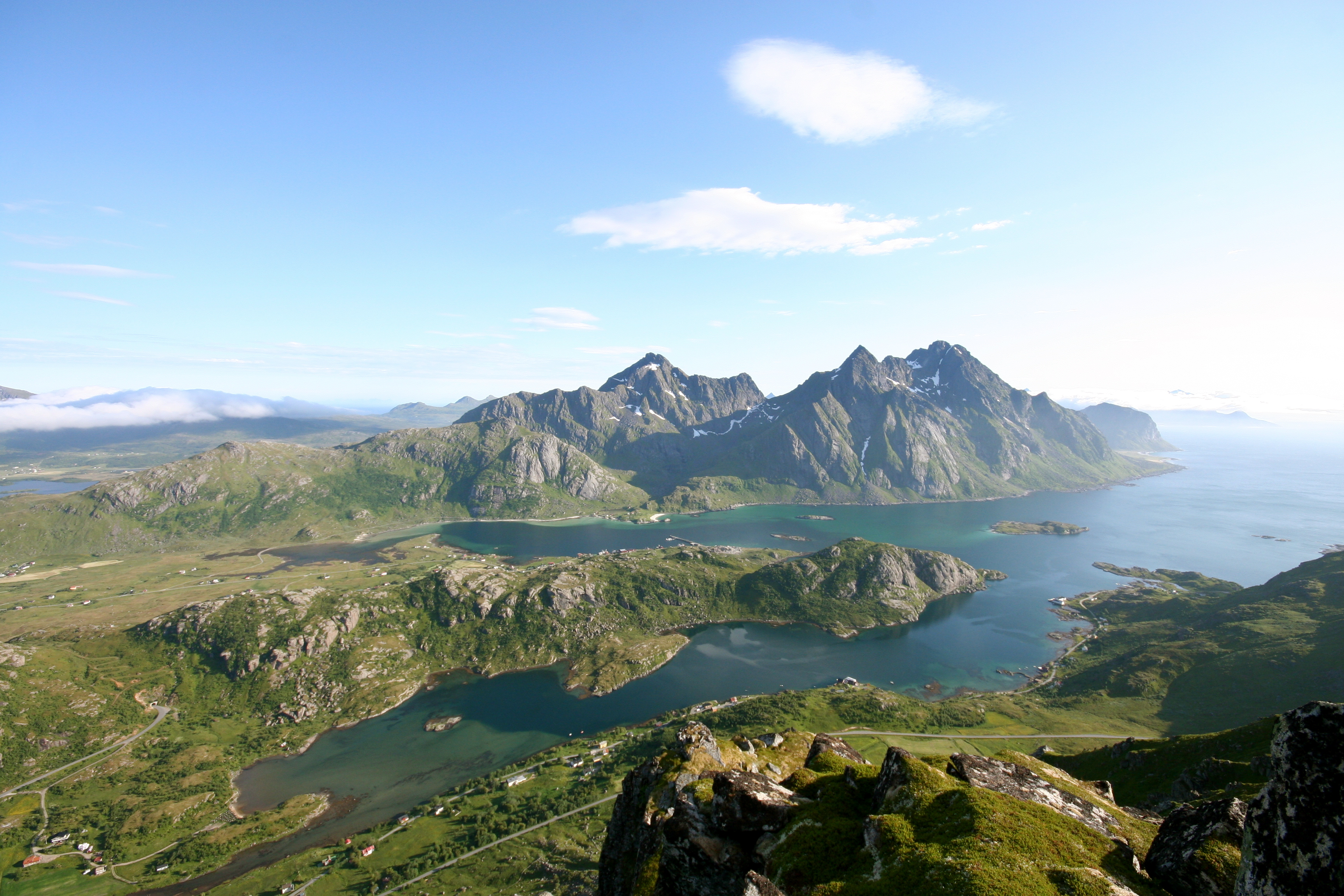 Steinsfjorden i Lofoten